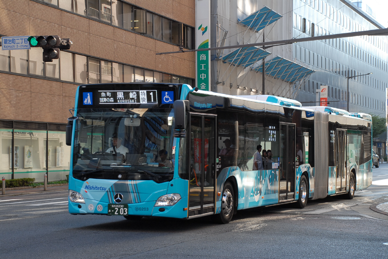 特別快速１番 連節バス 2019-7-22撮影